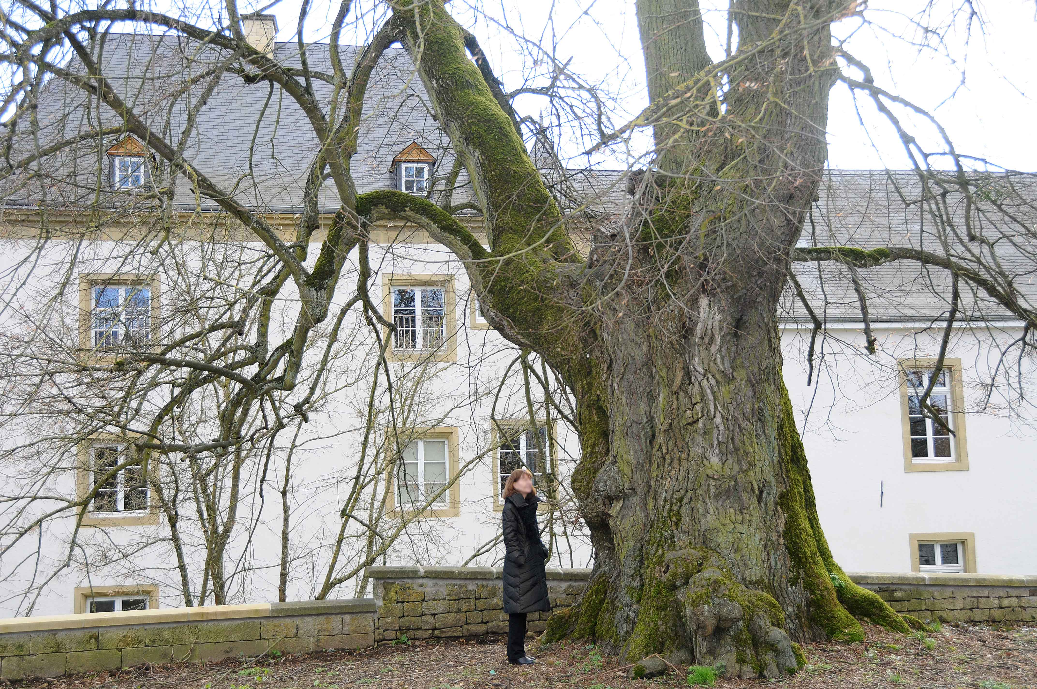 Lann zu Suessem. Suessem + Kategorie:Gemeng Suessem